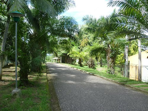 También conocida como granja los pericos.